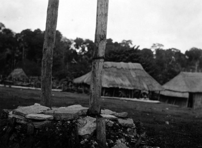 Foto. Een offerplaats, Timor